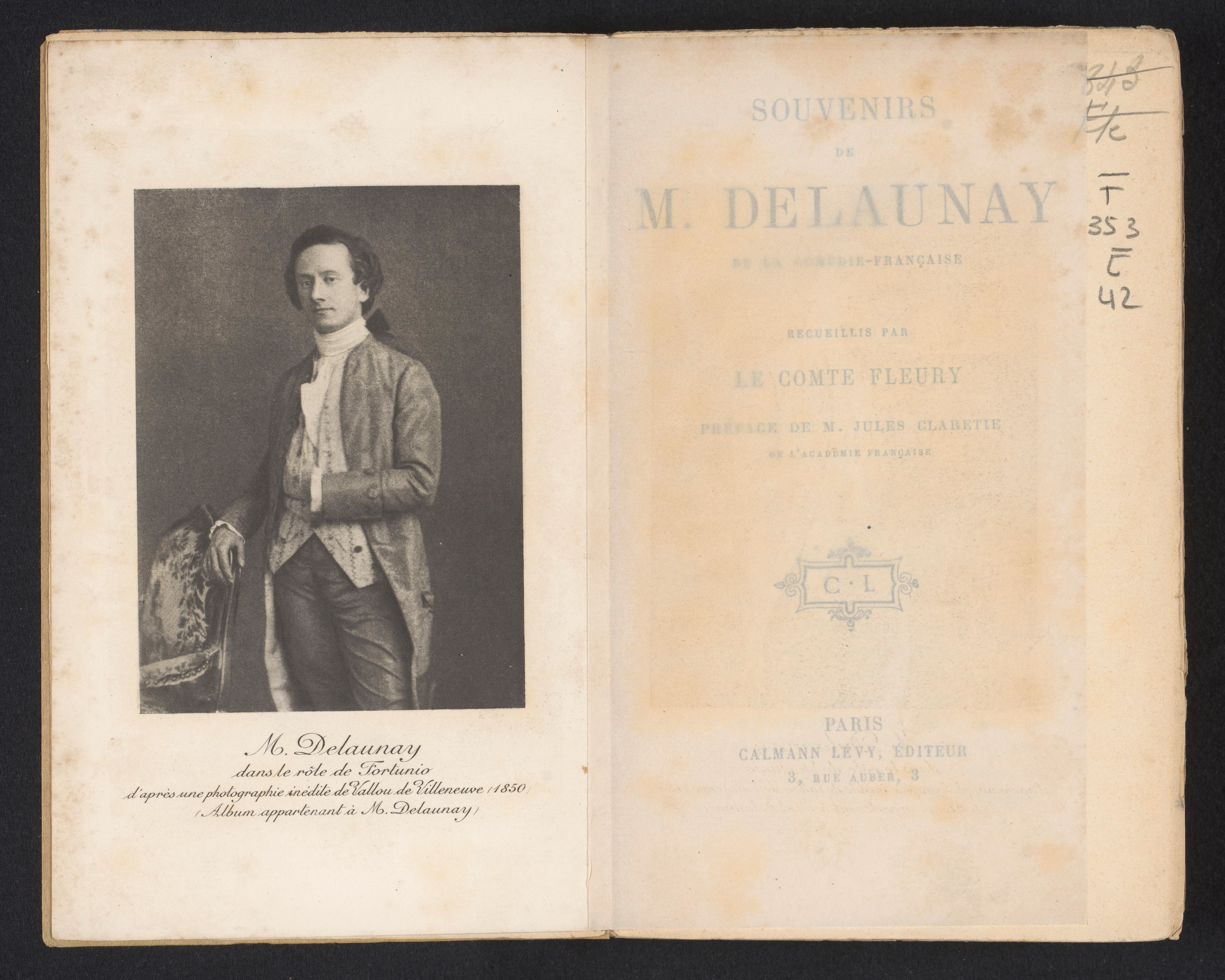 IdentificatieTitel(s): Portret van Louis-Arsène Delaunay als FortunioM. Delaunay dans le rôle de Fortunio (titel op object)Objecttype: fotomechanische afdruk bladzijde Objectnummer: RP-F-2001-7-141-1VervaardigingVervaardiger: fotograaf: Julien Vallou de Villeneuve (vermeld op object)clichémaker: anoniemDatering: ca. 1900Materiaal: papier Techniek: heliogravureAfmetingen: prent: h 108 mm × b 79 mmToelichtingPrent op frontispice.OnderwerpWat: portrait of actor, actressWie: Louis-Arsène DelaunayVerwerving en rechtenCredit line: Aankoop met steun van de Mondriaan Stichting, het Prins Bernhard Cultuurfonds, het VSBfonds, het Paul Huf Fonds/Rijksmuseum Fonds en het Egbert KunstfondsVerwerving: aankoop 2001Copyright: Publiek domein